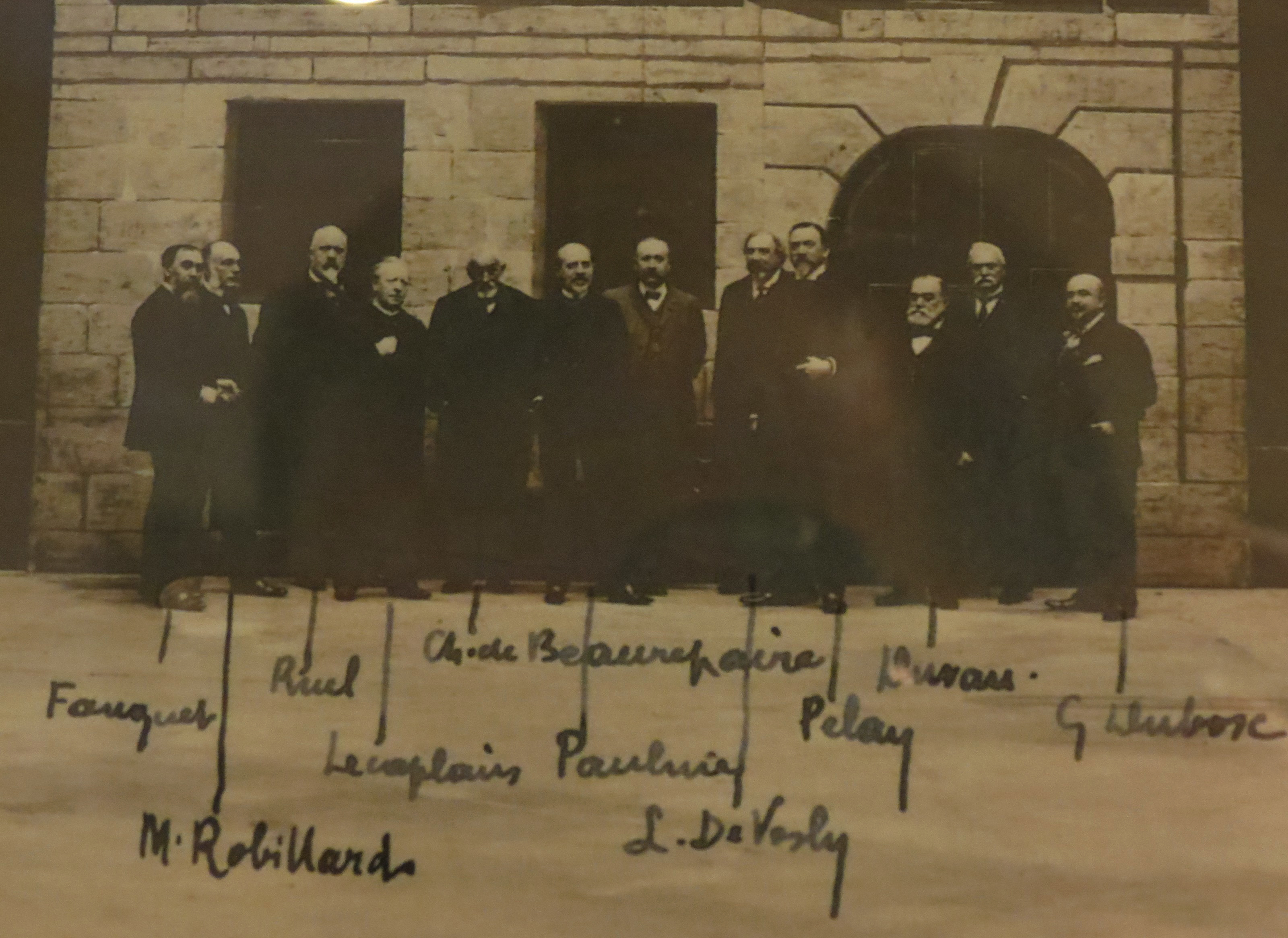 Extrait d'une photographie prise entre 1906 et 1908 des acteurs du rachat de la maison de Pierre Corneille devant une fausse façade reconstituée pour le bicentenaire de sa mort en 1884 au musée des Beaux-Arts de Rouen. Y figurent de gauche à droite : Eugène Fauquet (1850-1926), architecte et futur restaurateur de la maison, M. Robillard, Georges Ruel (1860-1942), architecte, Arthur Lecaplain (1839-1916), directeur de l'école supérieure des sciences et lettres, Charles de Beaurepaire (1828-1908), historien et archiviste, Henri Paulme (1849-1941), banquier et conservateur, une personne inconnue, Léon de Vesly (1844-1920) archéologue et architecte, Édouard Pelay (1842-1921), bibliophile qui fera don de sa collection cornélienne, Duvau, une personne inconnue et Georges Dubosc (1854-1927), peintre et journaliste.